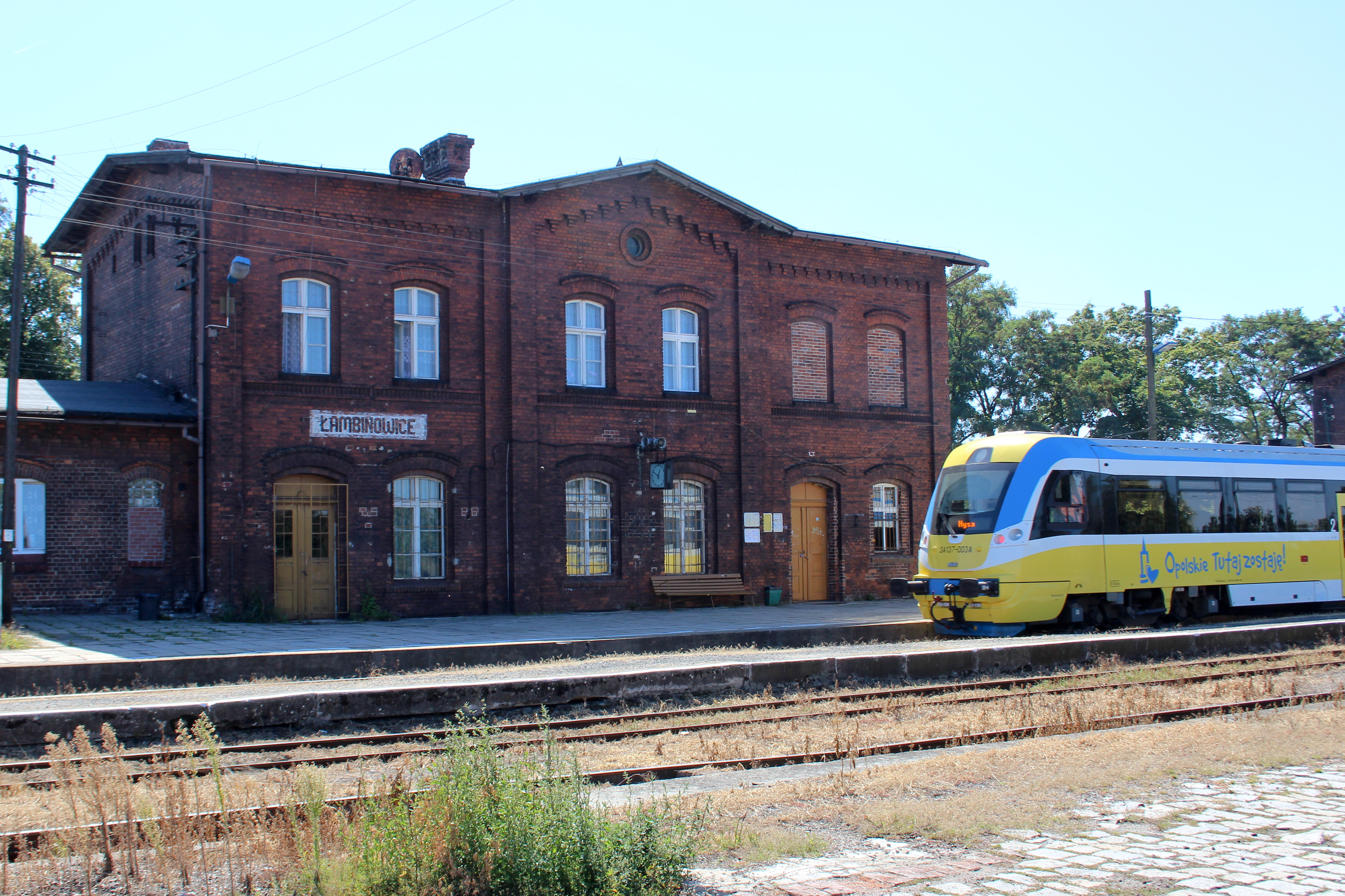 Stacja kolejowa w Łambinowicach - wieś w Polsce w województwie opolskim, w powiecie nyskim w gminie Łambinowice, której jest siedzibą.